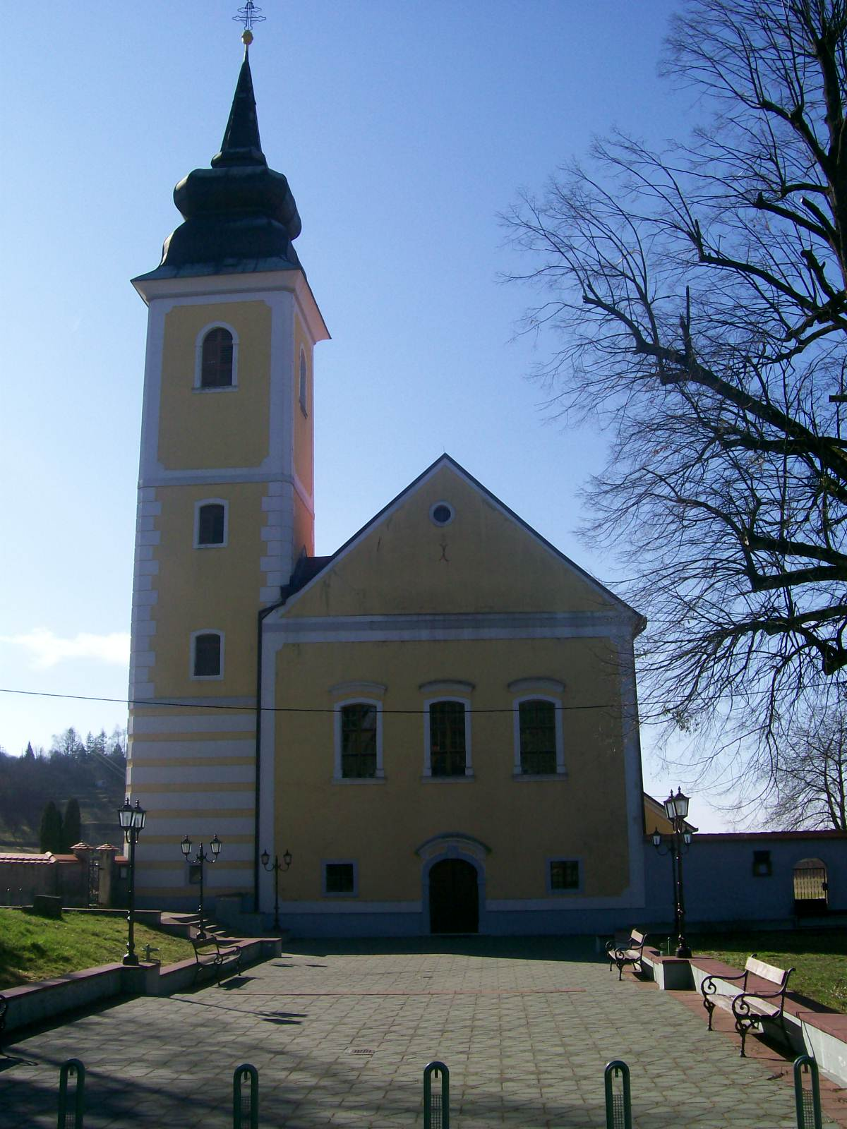 Crkva Blažene Djevice Marije u Marija Gorici